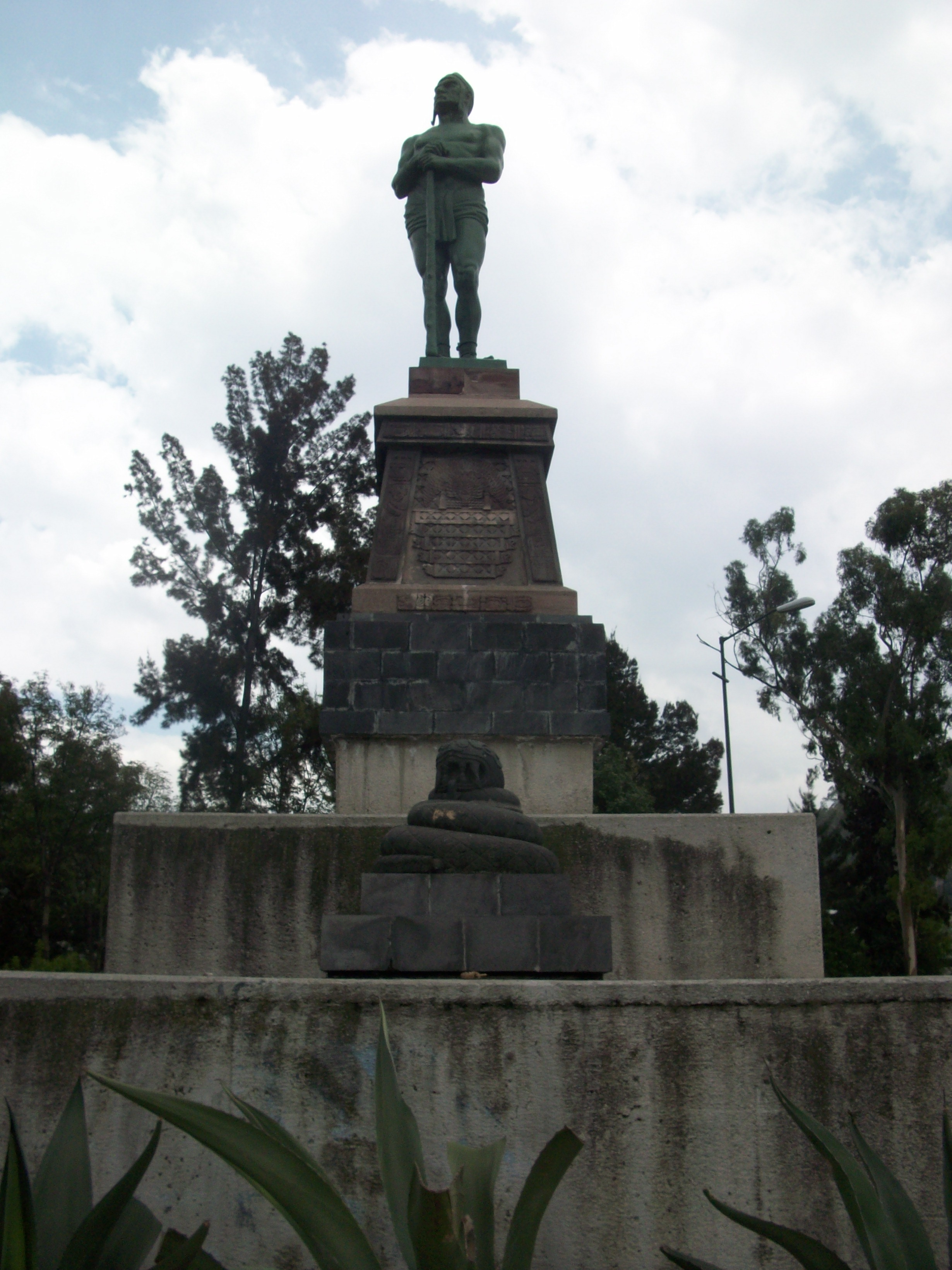 Estatua de Indios verdes en su basamento